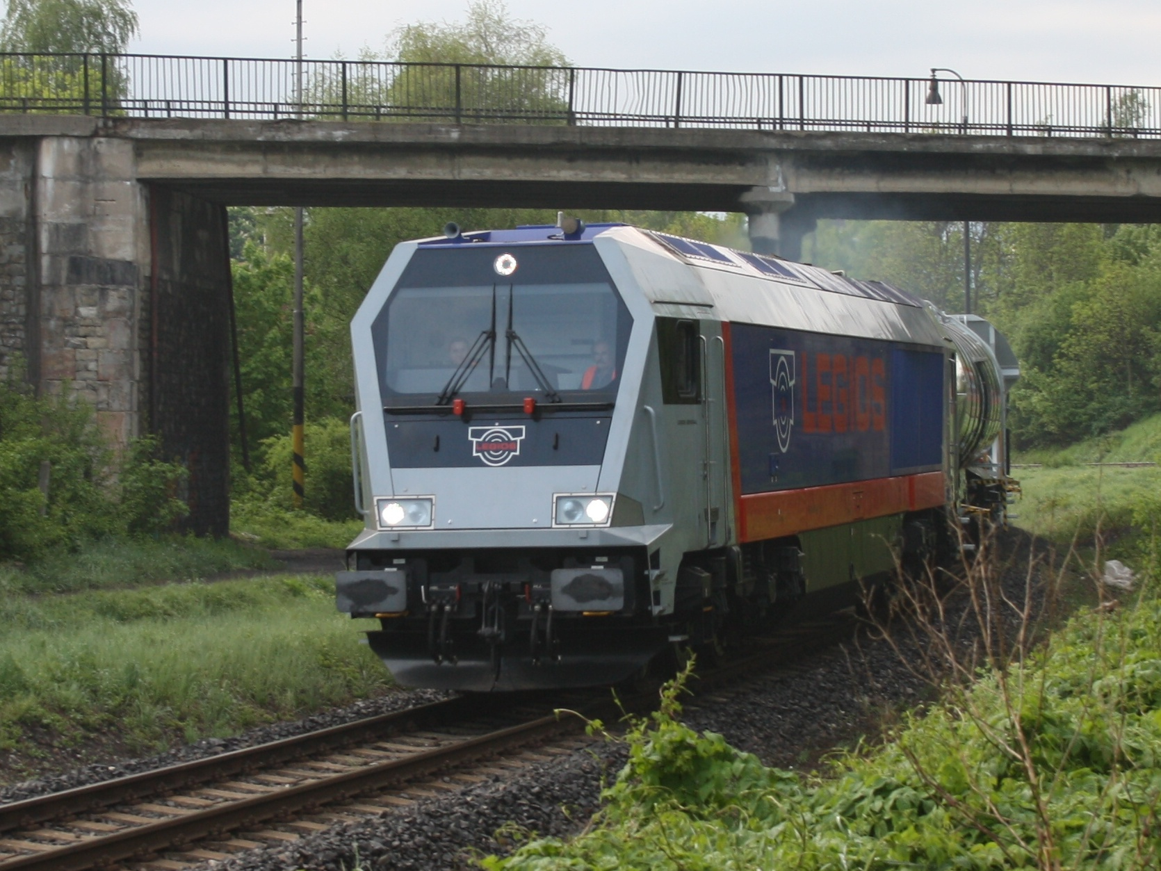 Vlak v čele s prototypem lokomotivy Legios General a dále s dvěma nákladními železničními vozy vyjíždí z lounského hlavního nádraží přes Most do Mnichova na veletrh Transport Logistic.